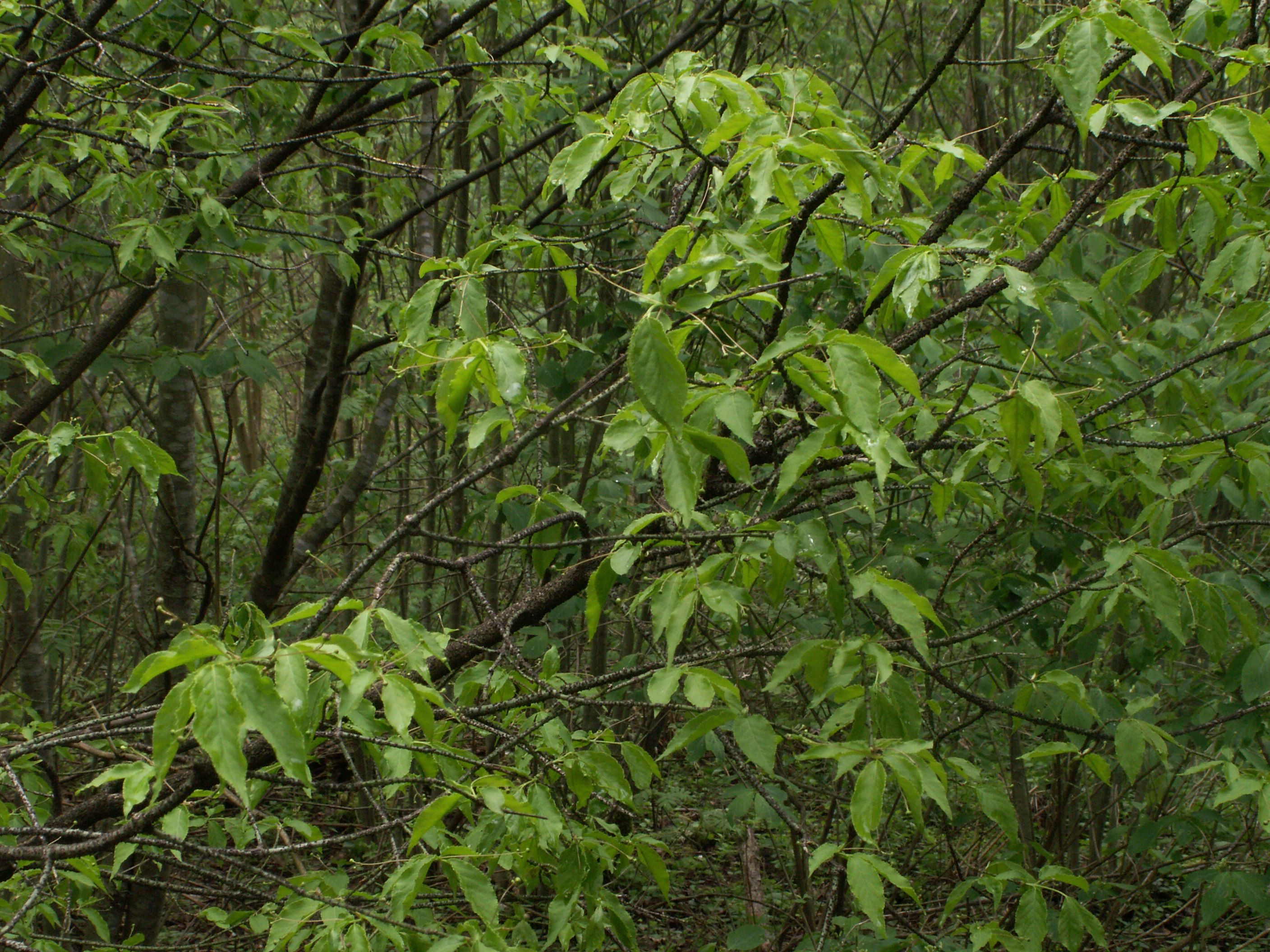 Euonymus verrucosa, habitus